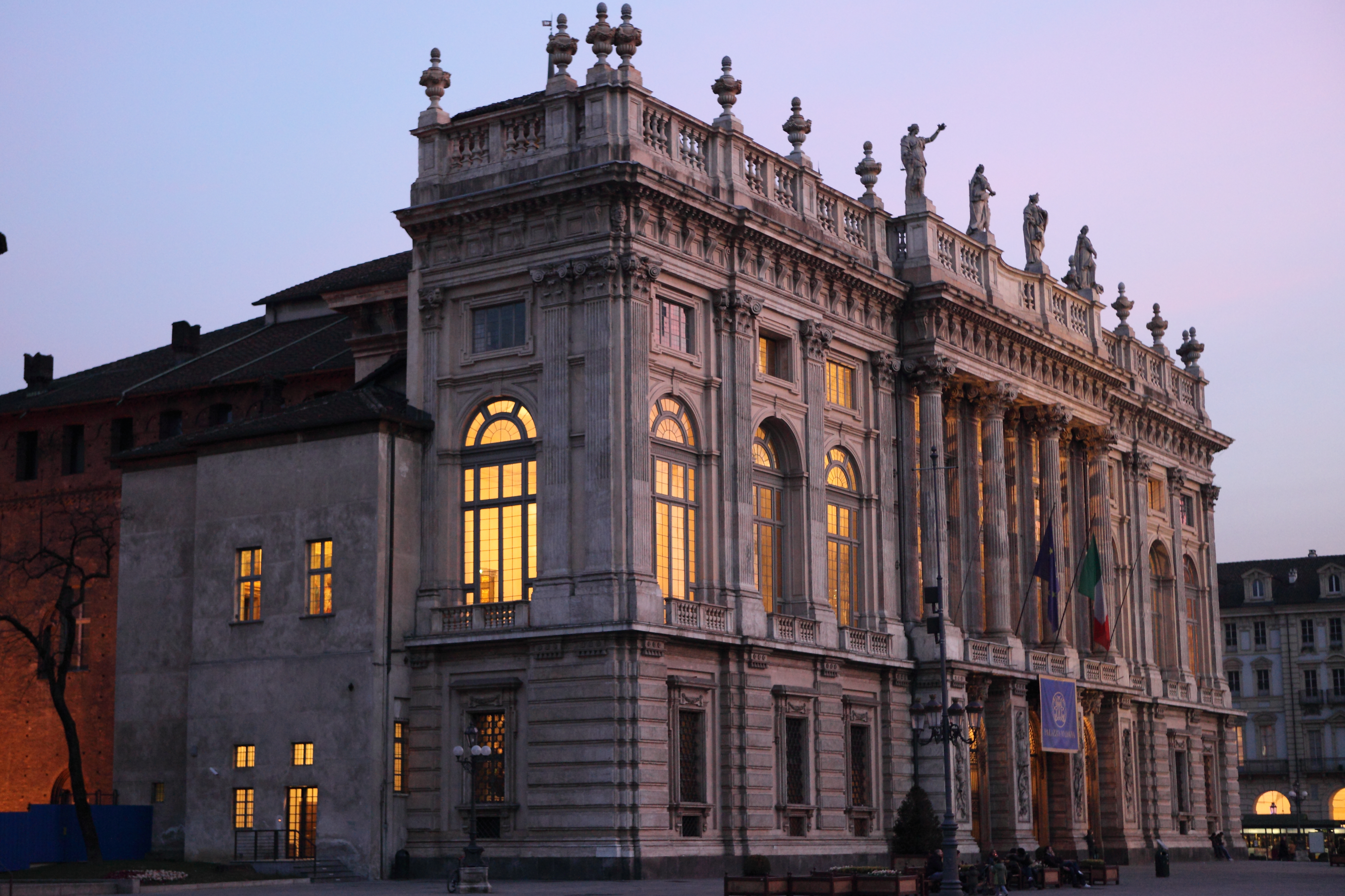 Palazzo Madama (Torino), facciata dello Juvarra